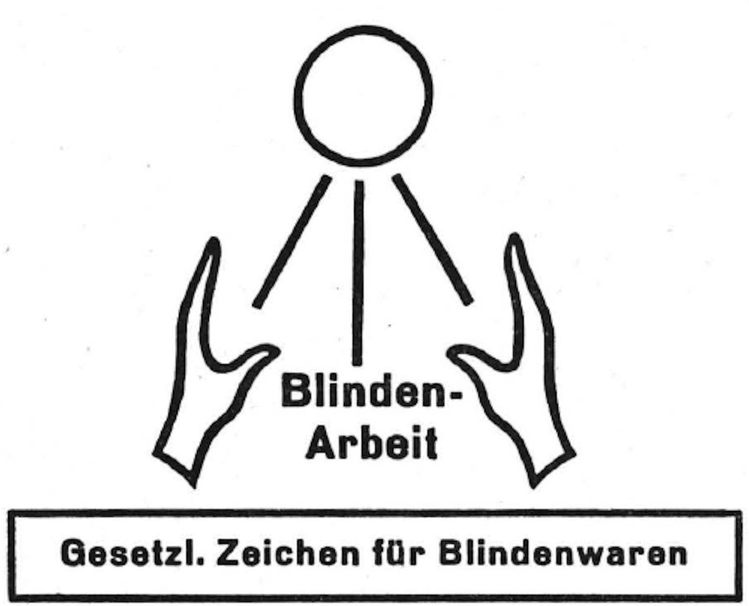 Einweihung Geschäftsstelle Dortmund, 1956 Sondernummer der Nachrichten für die Blinden in Westfalen, September 1956